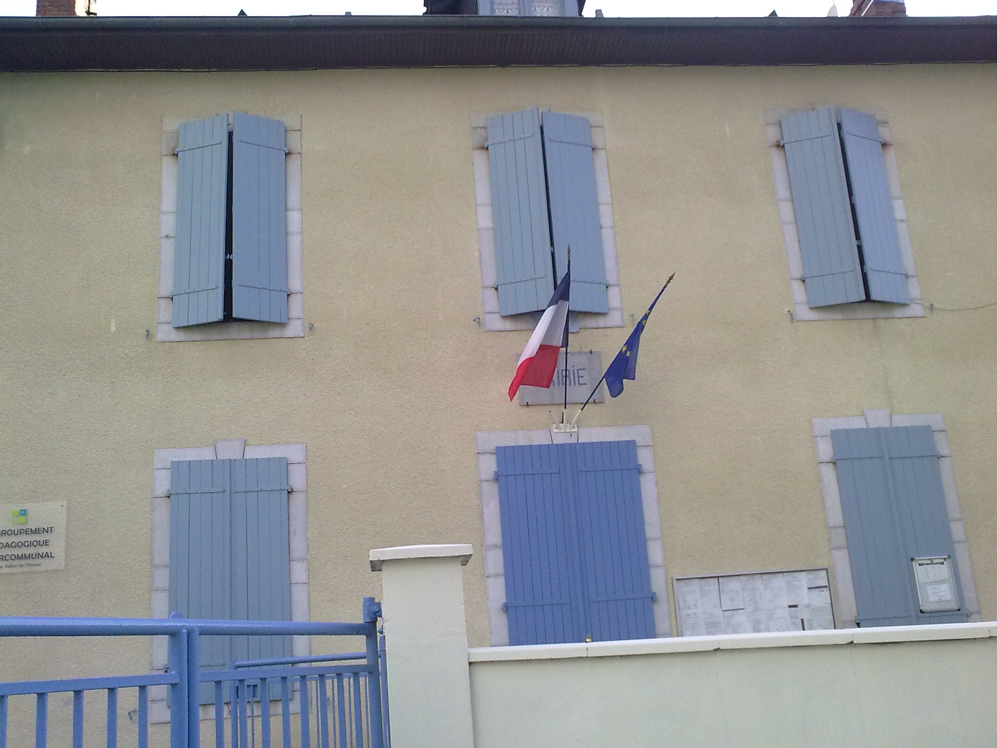 Herrère le 24 mai 2010. France.